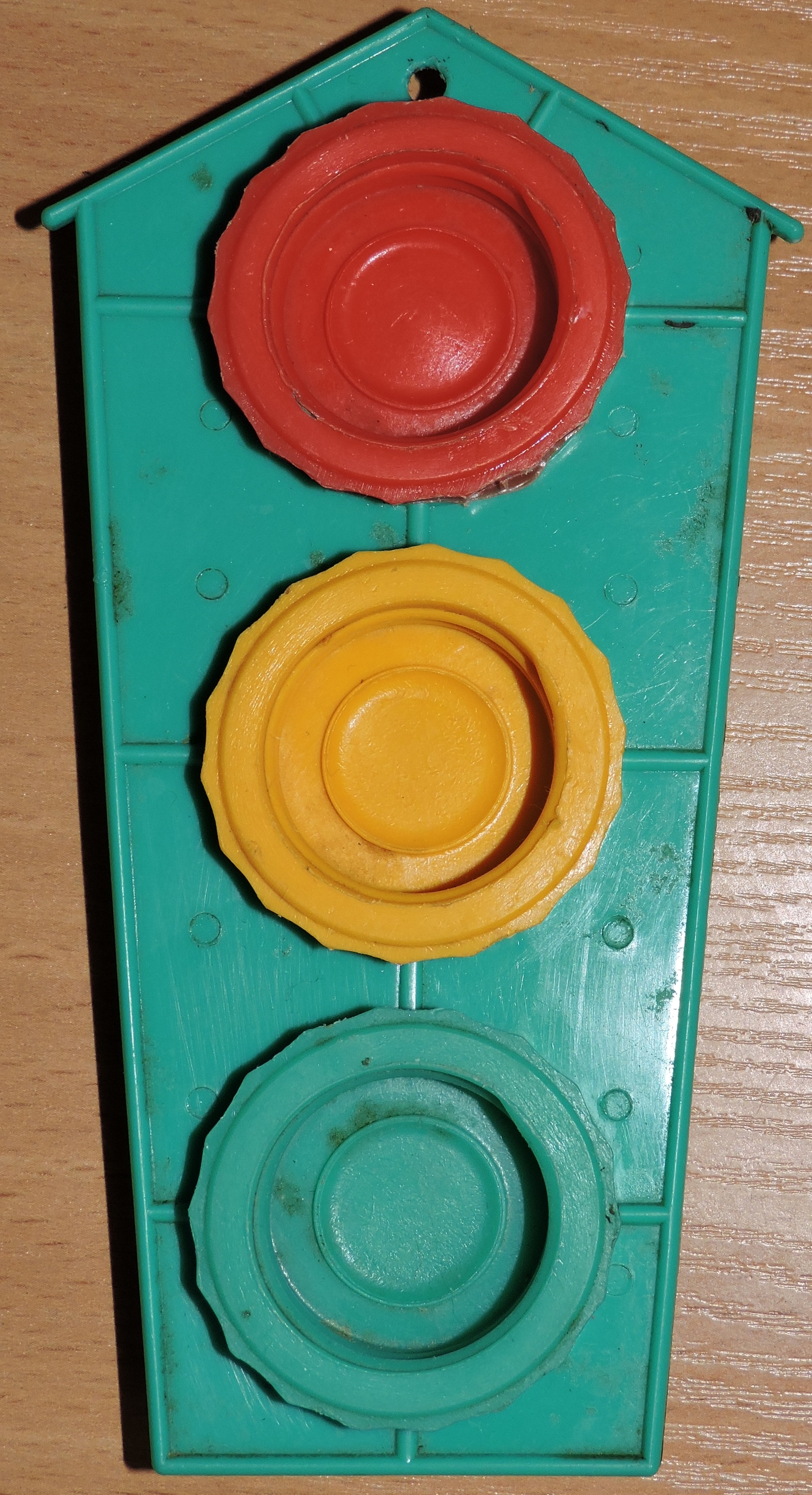 Советский набор крышек в виде светофора